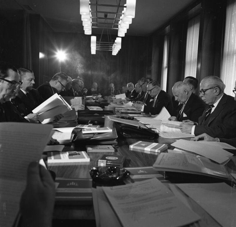 Vorstandssitzung des Deutschen Industrie- und Handelstages (Hettlagehaus) Bonn